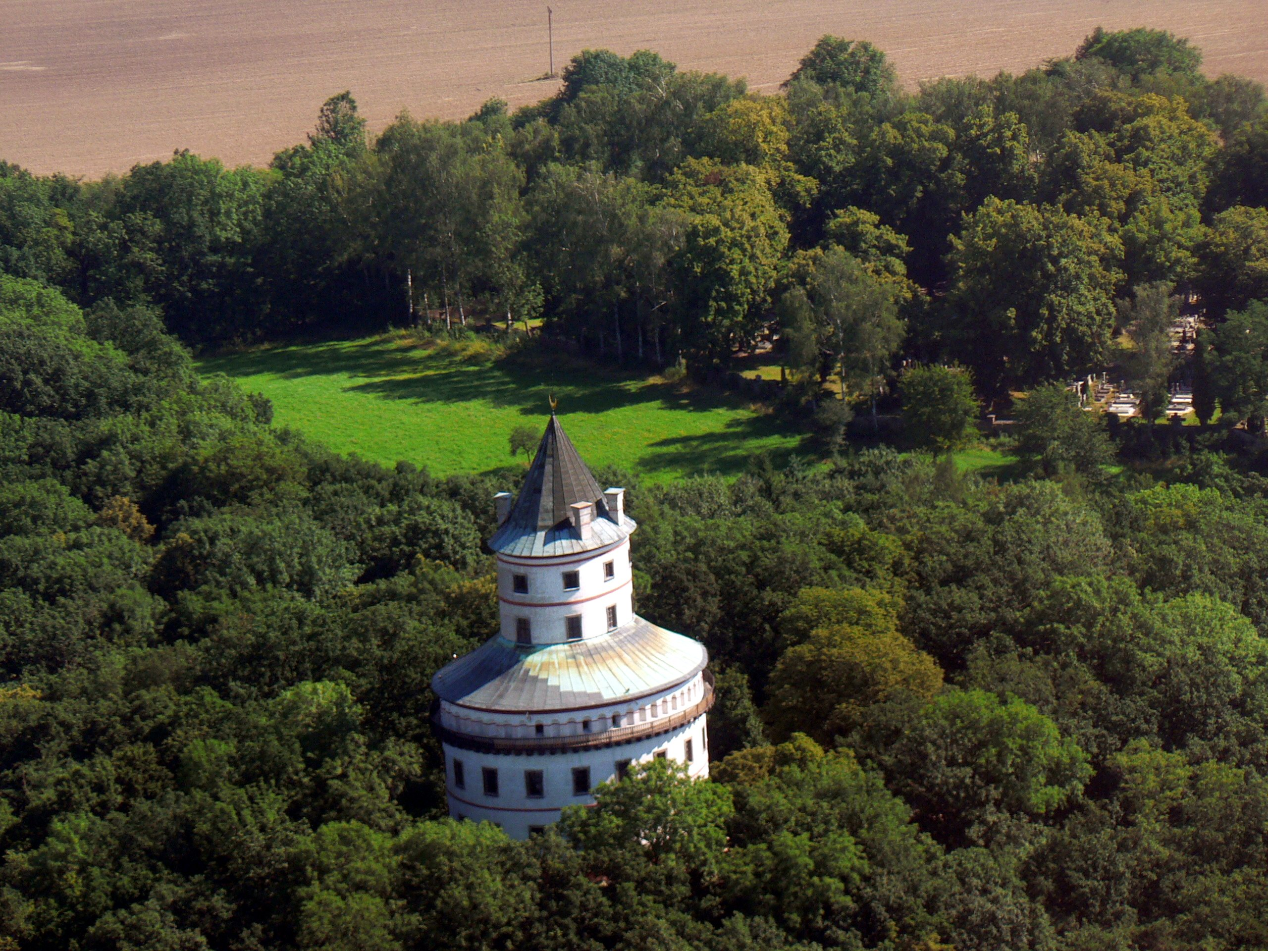 Letecký pohled na zámek Humprecht